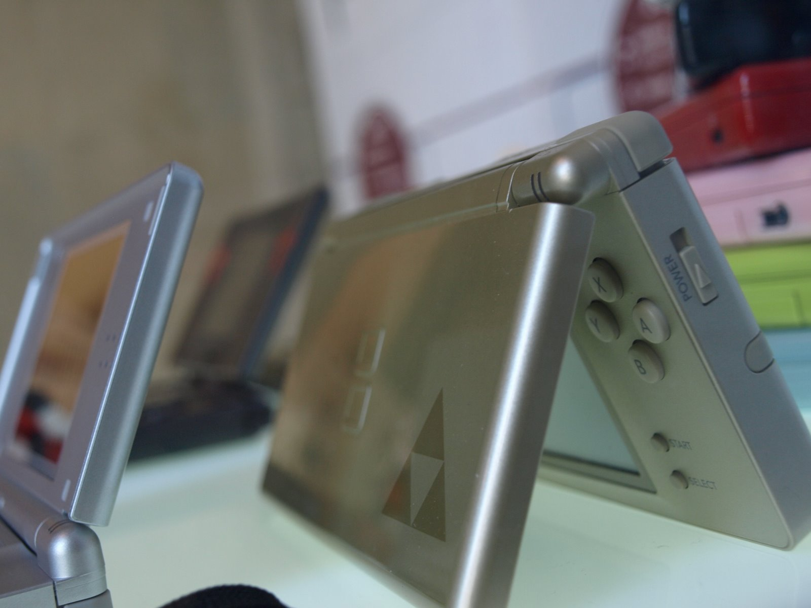 Nintendo DS Lite de exposición. Es la edición Zelda, con el símbolo de la trifuerza.